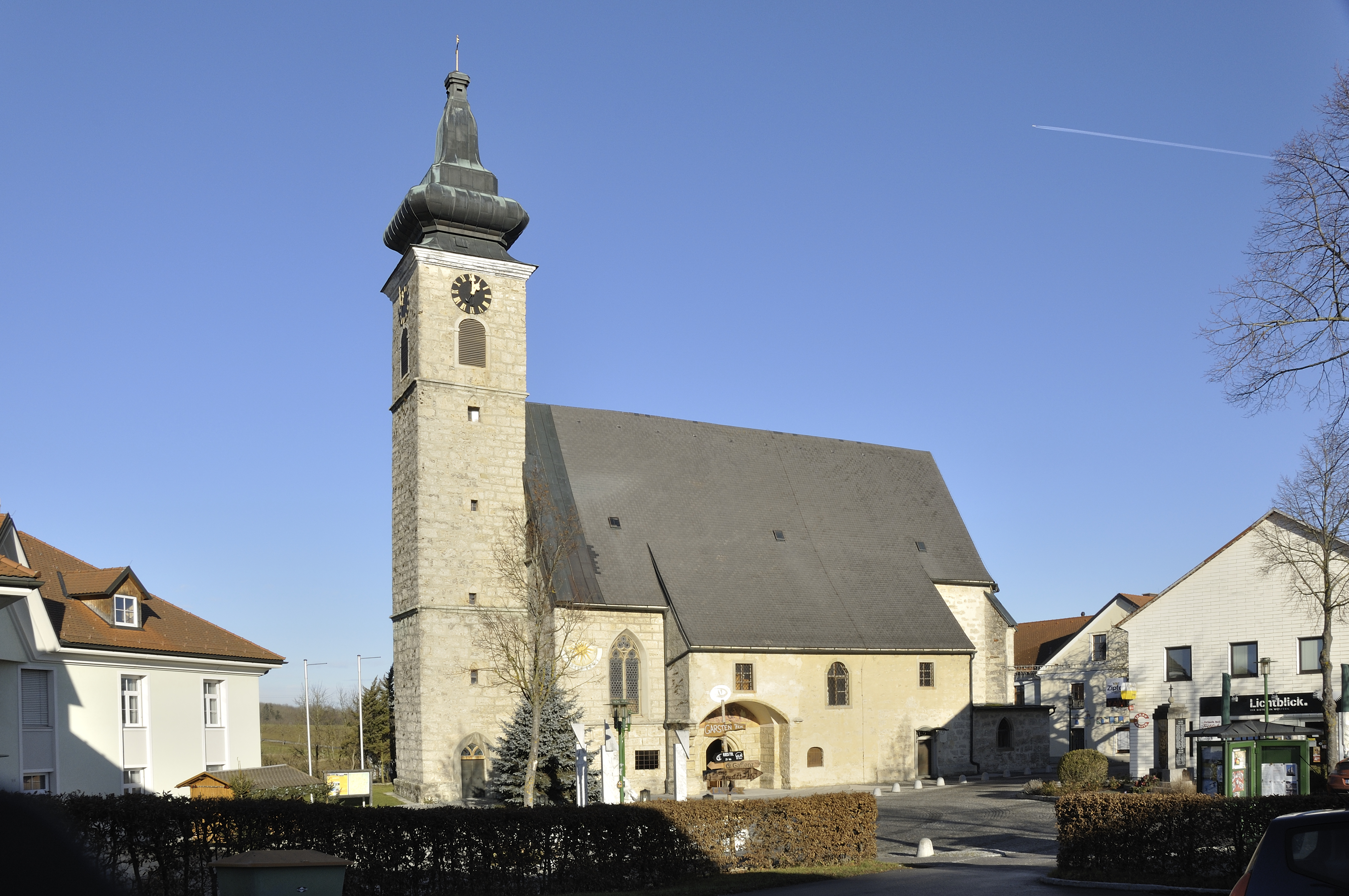 Kath. Pfarrkirche hl. Martin